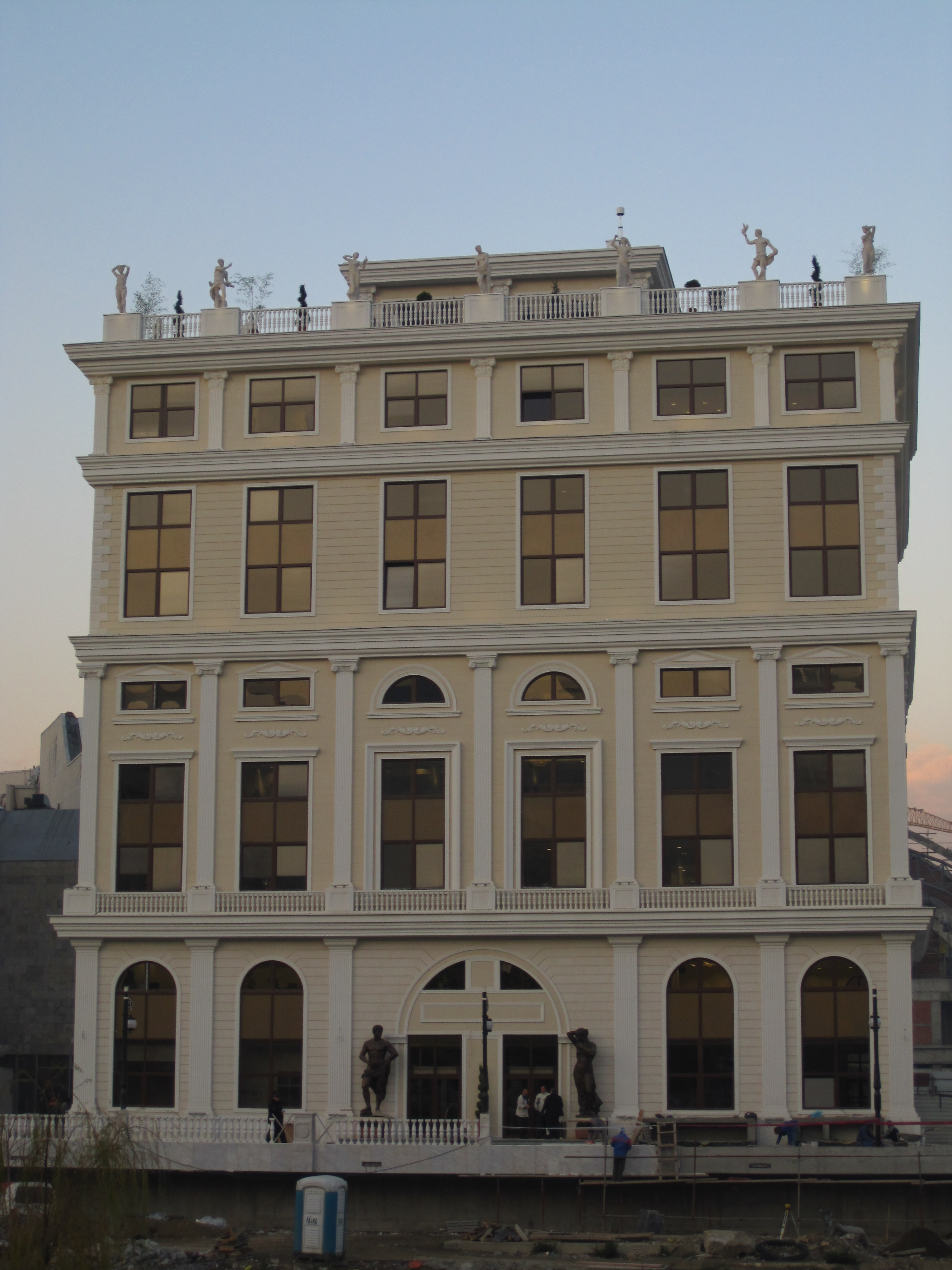 АЕК - Агенција за Електронски Комуникации - Скопје